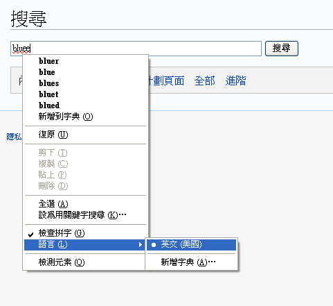 中文（台灣）: Mozilla Firefox在中文維基百科的拼字檢查功能，這是輸入「bluee」的結果